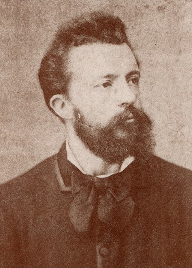 Portrait d'Evariste Carpentier (Paris, vers 1882)